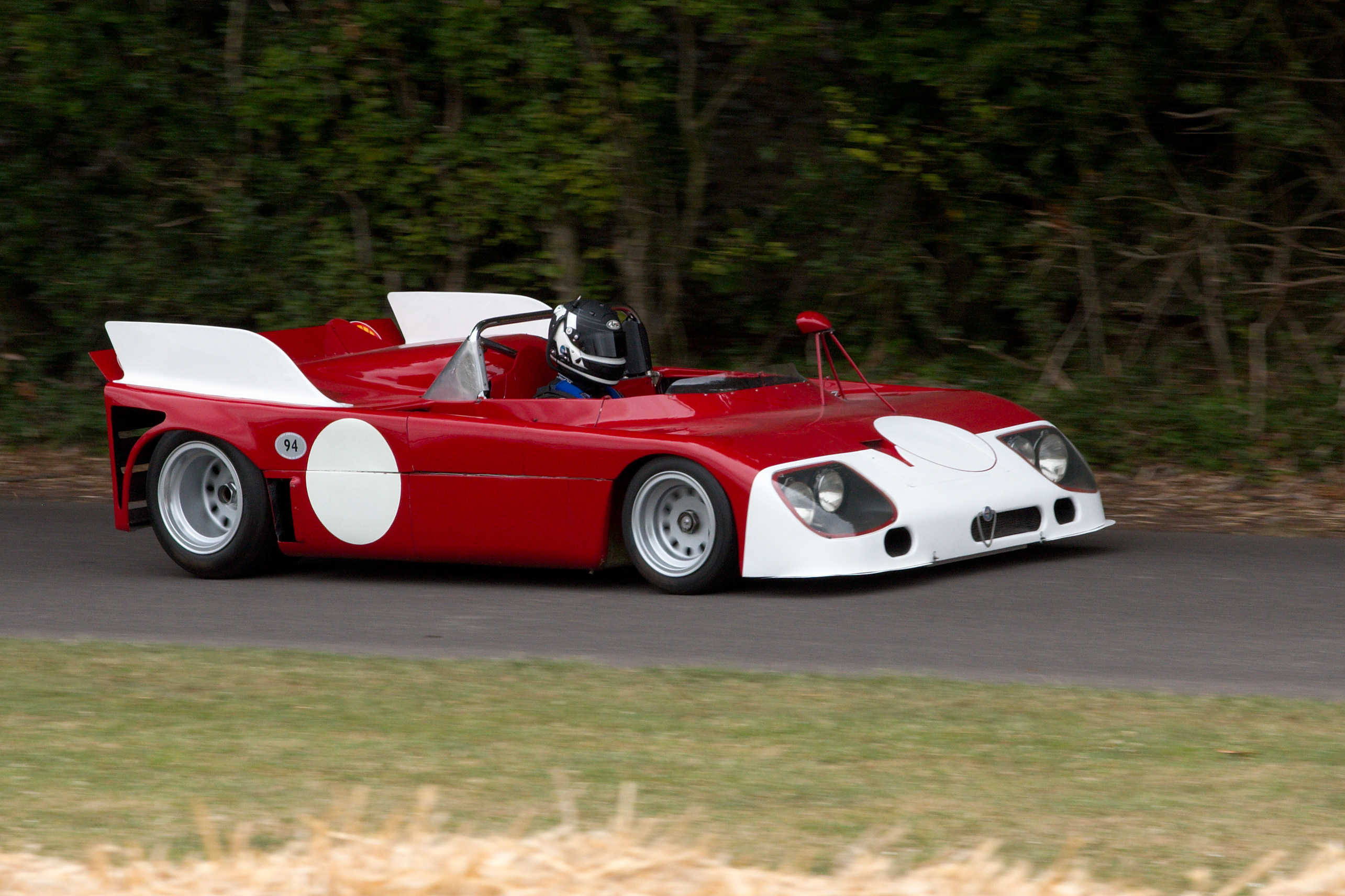 Alfa Romeo Tipo 33 TT3